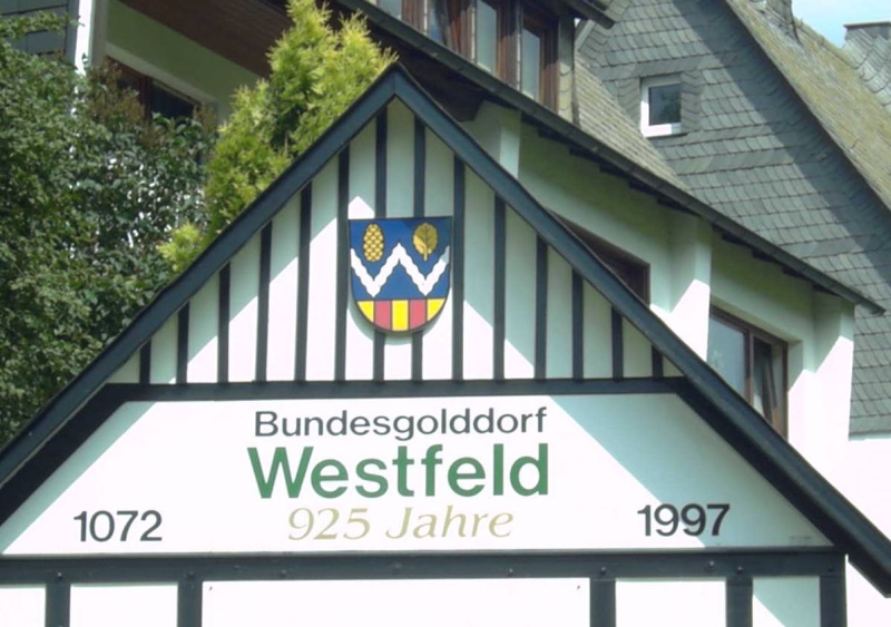 Westfeld (Schmallenberg)_Tafel mit Wappen, Germany.